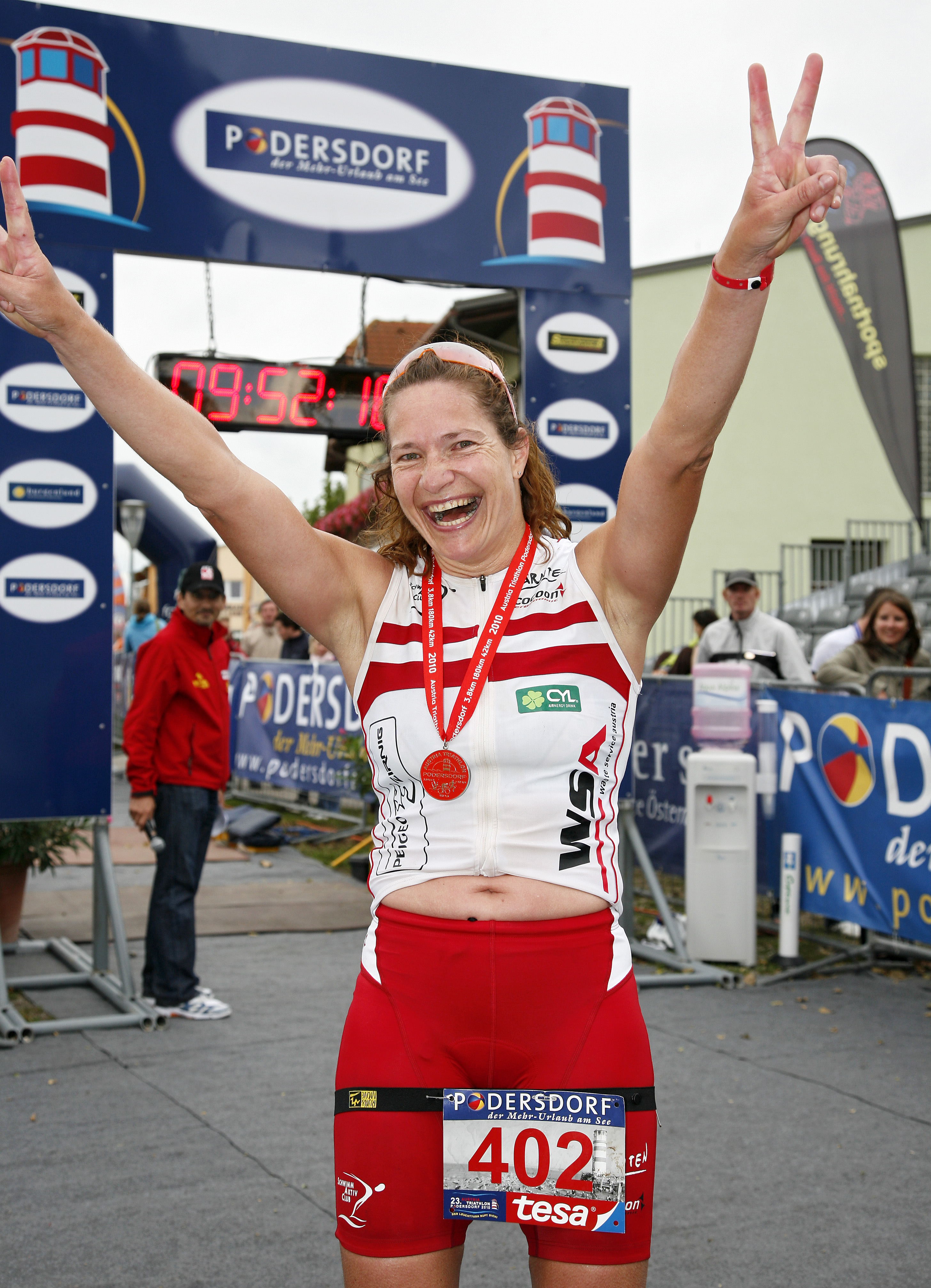 Constance Mochar beim Austria-Triathlon in Podersdorf, 2010